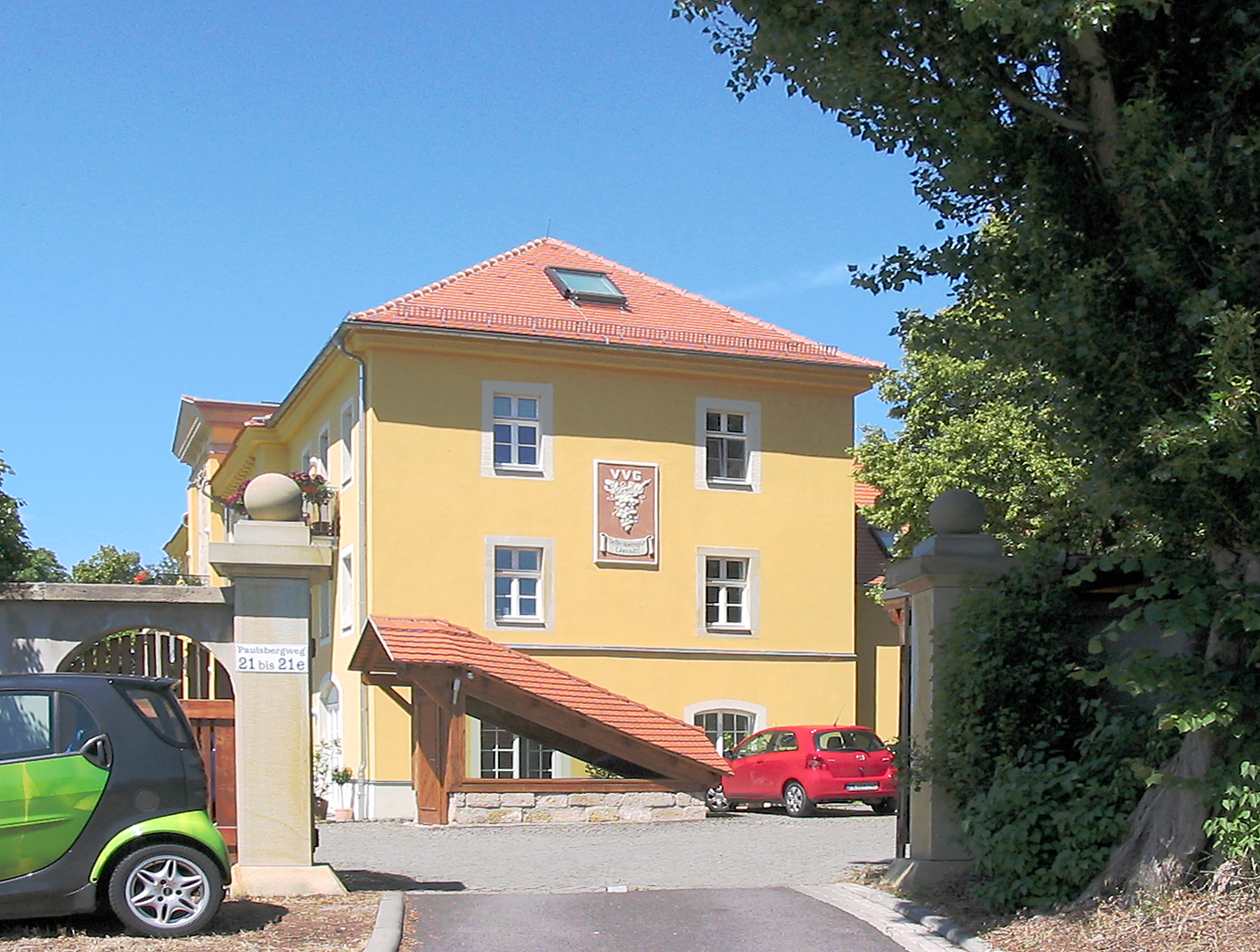 Radebeul, Gebäudegruppe des Paulsberg (Lößnitz), Toranlage, am Gebäude das Wappen des Volkseigenen Weinguts